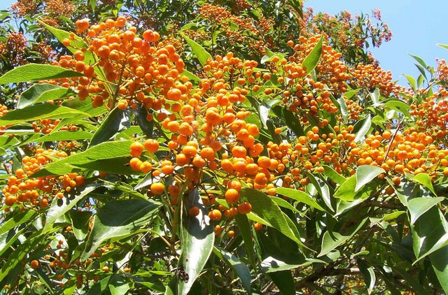 Auranticarpa rhombifolia at Mt Keira